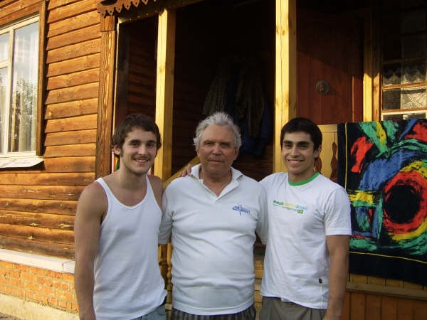 Felipe Piña junto a Eugenio Belov y Tomás Gonzáles